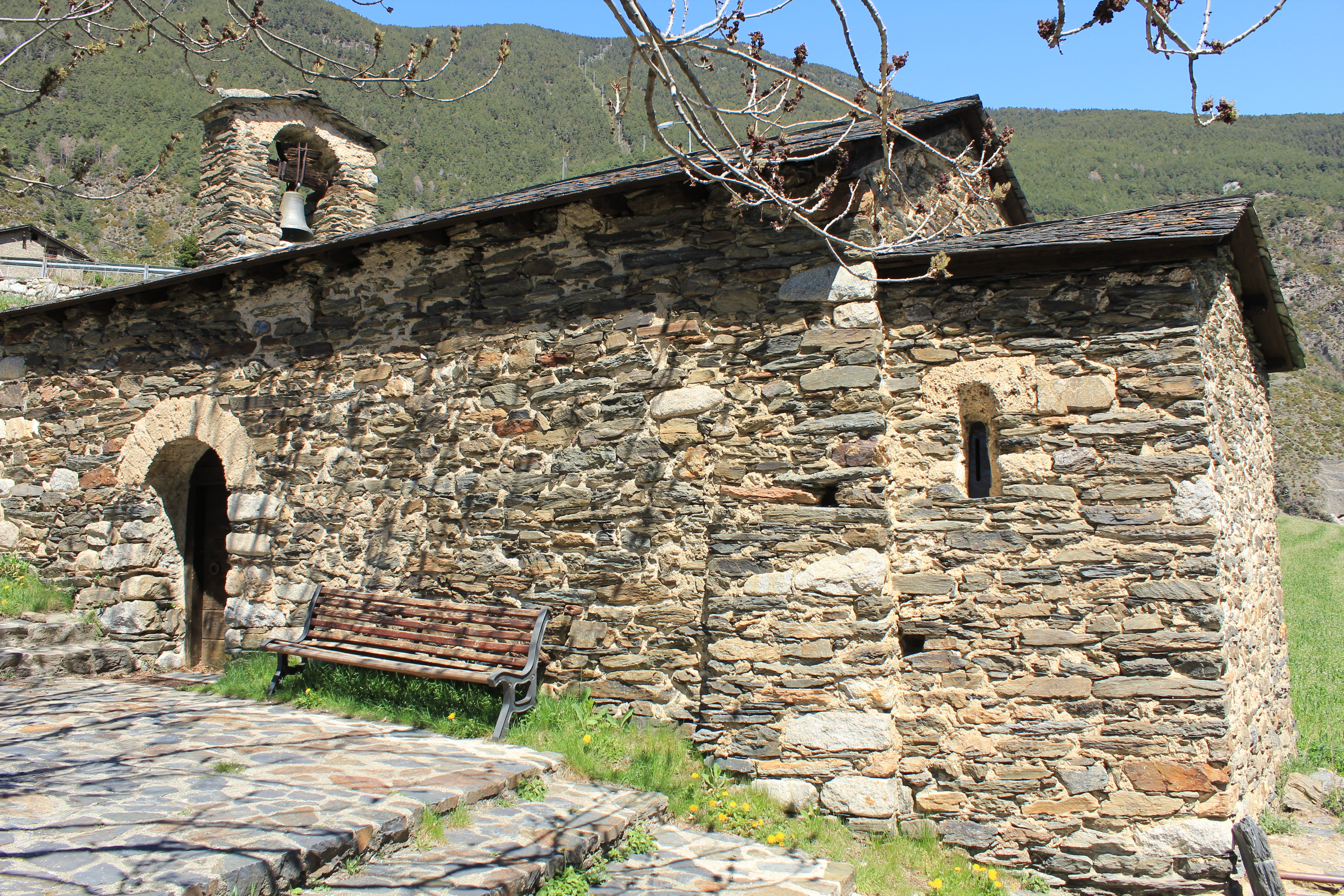 Església de Sant Romà de Vila